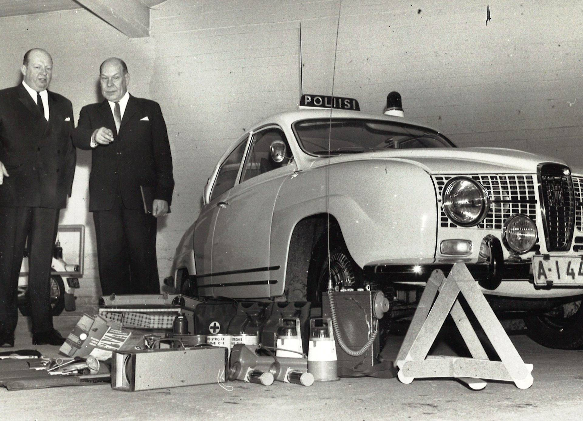 Toimitusjohtaja Claes Rydman (vas.) lahjoittaa liikkuvalle poliisille ”hyvän tahdon partioauton”. Auton vastaanottaa ylipoliisipäällikkö Fjalar Jarva.